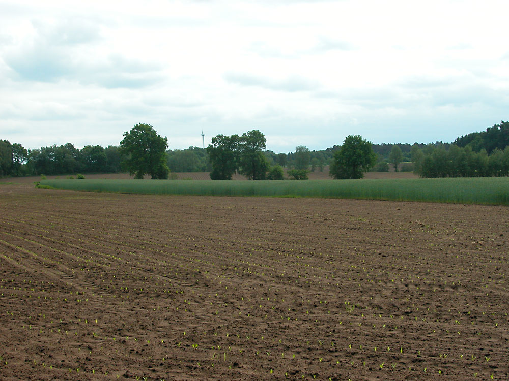 Dorsten-Rhade. Braunerden. Nord-West.